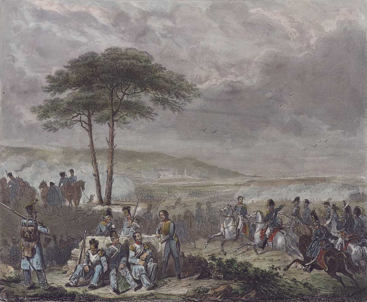 Representación da Batalla de Elviña o 16 de maio de 1809.